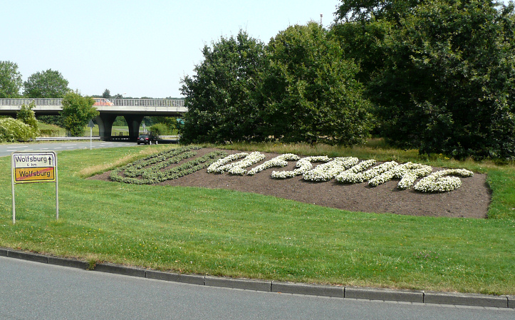 Rabatte am Ortseingang WOB-Detmerode